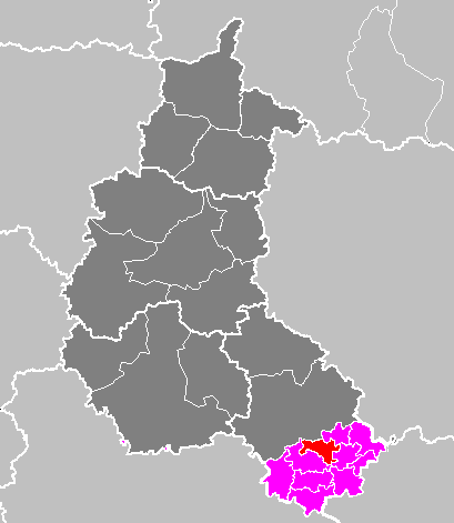 Maps of arrondissements and cantons of France: Arrondissement de Langres - Canton de Neuilly-l'Évêque.PNG